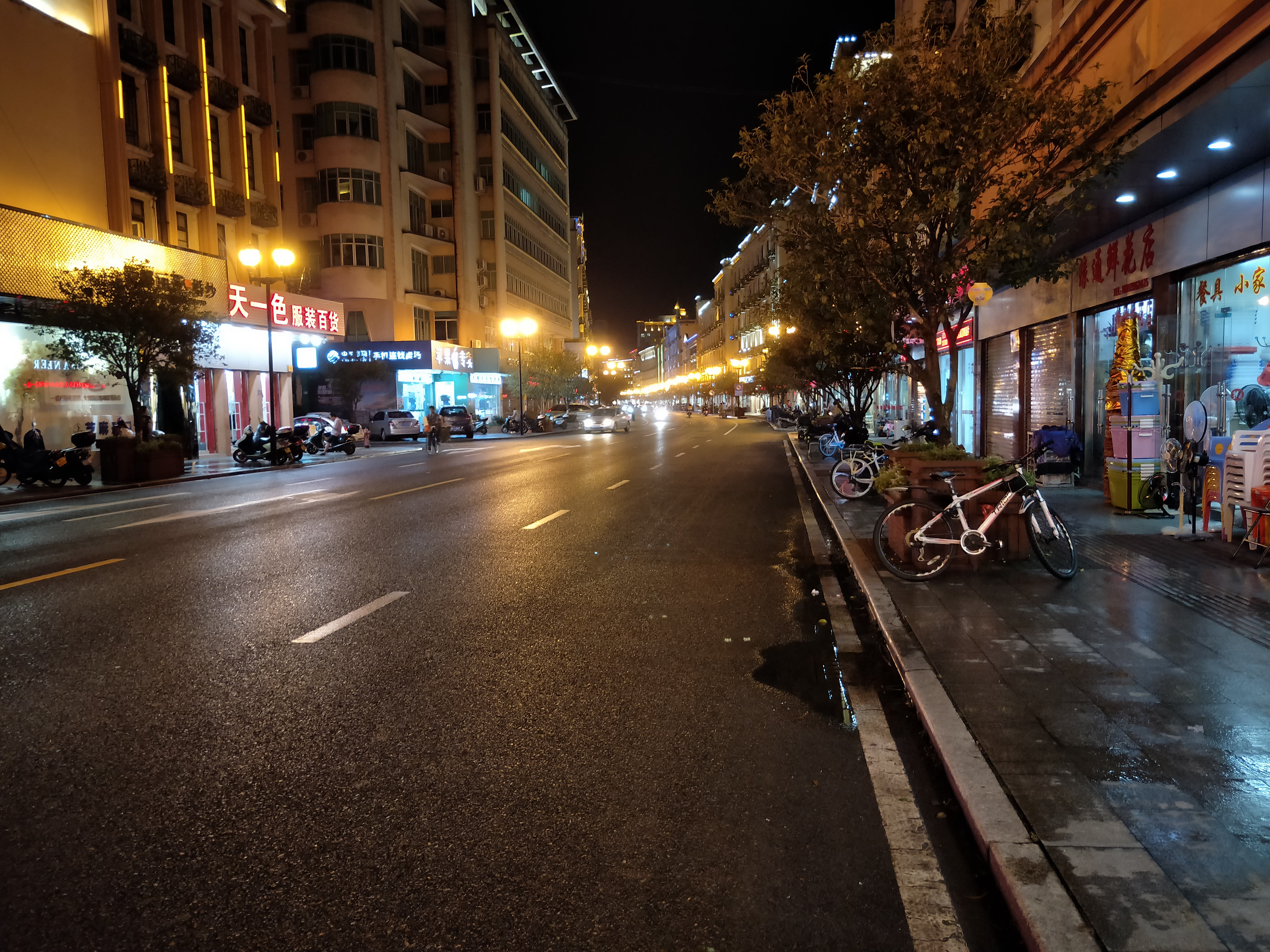 中文（中国大陆）: 永春城关街景